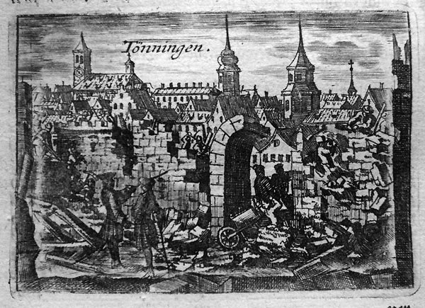 Tönning 1714: Tönninger Festung wird geschleift, betitelt „Tönningen capitulirt, wird geschleifft.“ Original-Kupferstich von 1740. Aus Imhof "Historischer Bildersaal".